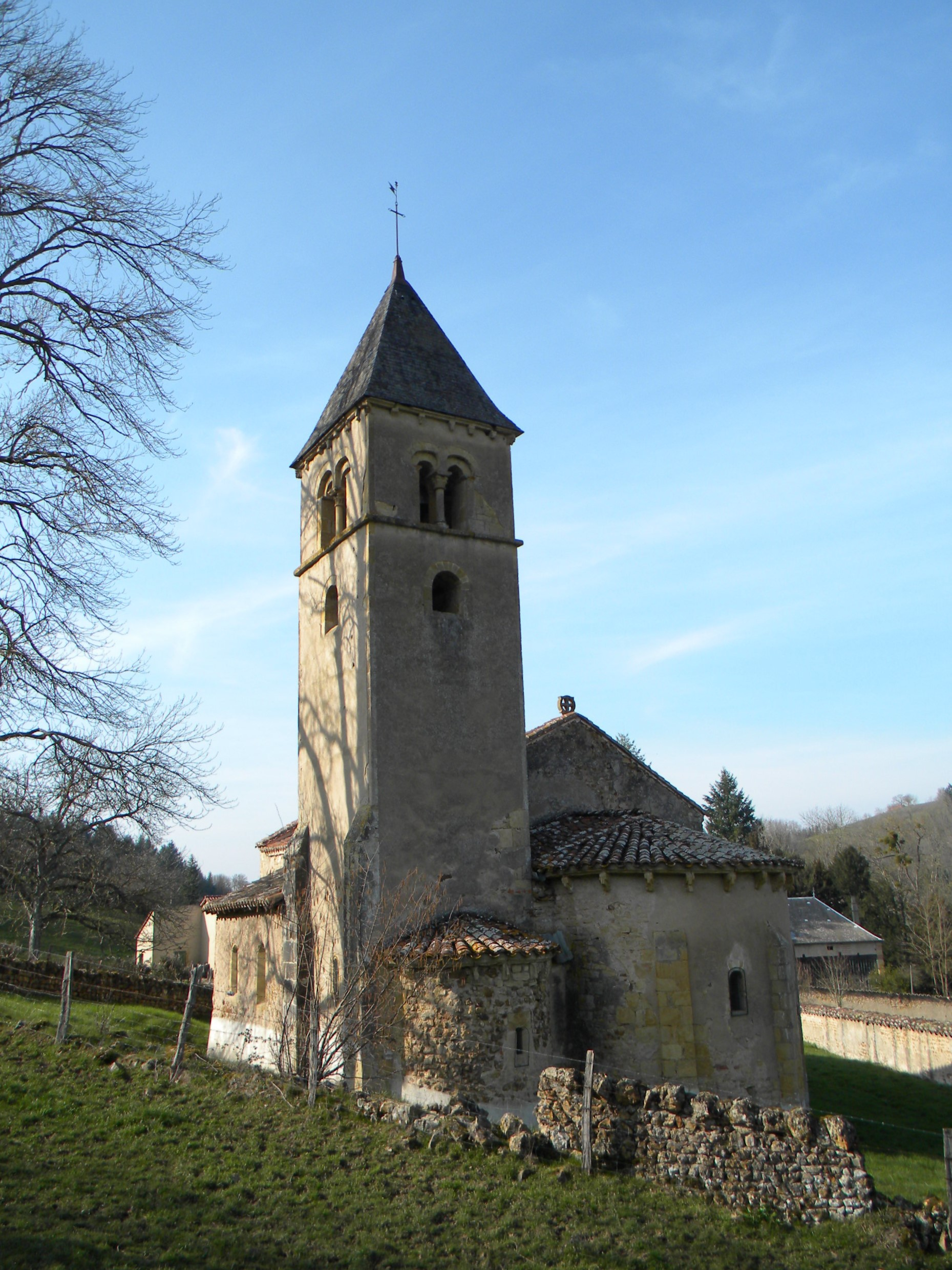 Chapelle de Saint-Martin-la-Vallée sur la commune de Semur-en-Brionnais, dans le département de Saône-et-Loire, France ; chevet